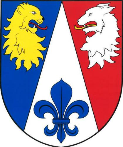 Tetín (okres Jičín), znak obce